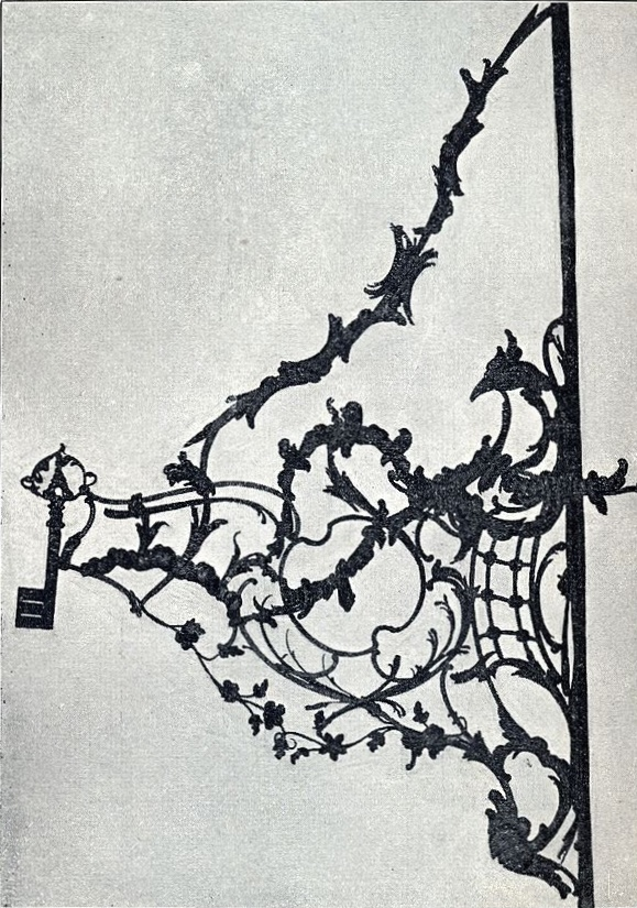 Königsberg, Altstädtische Sattlergasse Nr. 5, Schlosserschildhalter